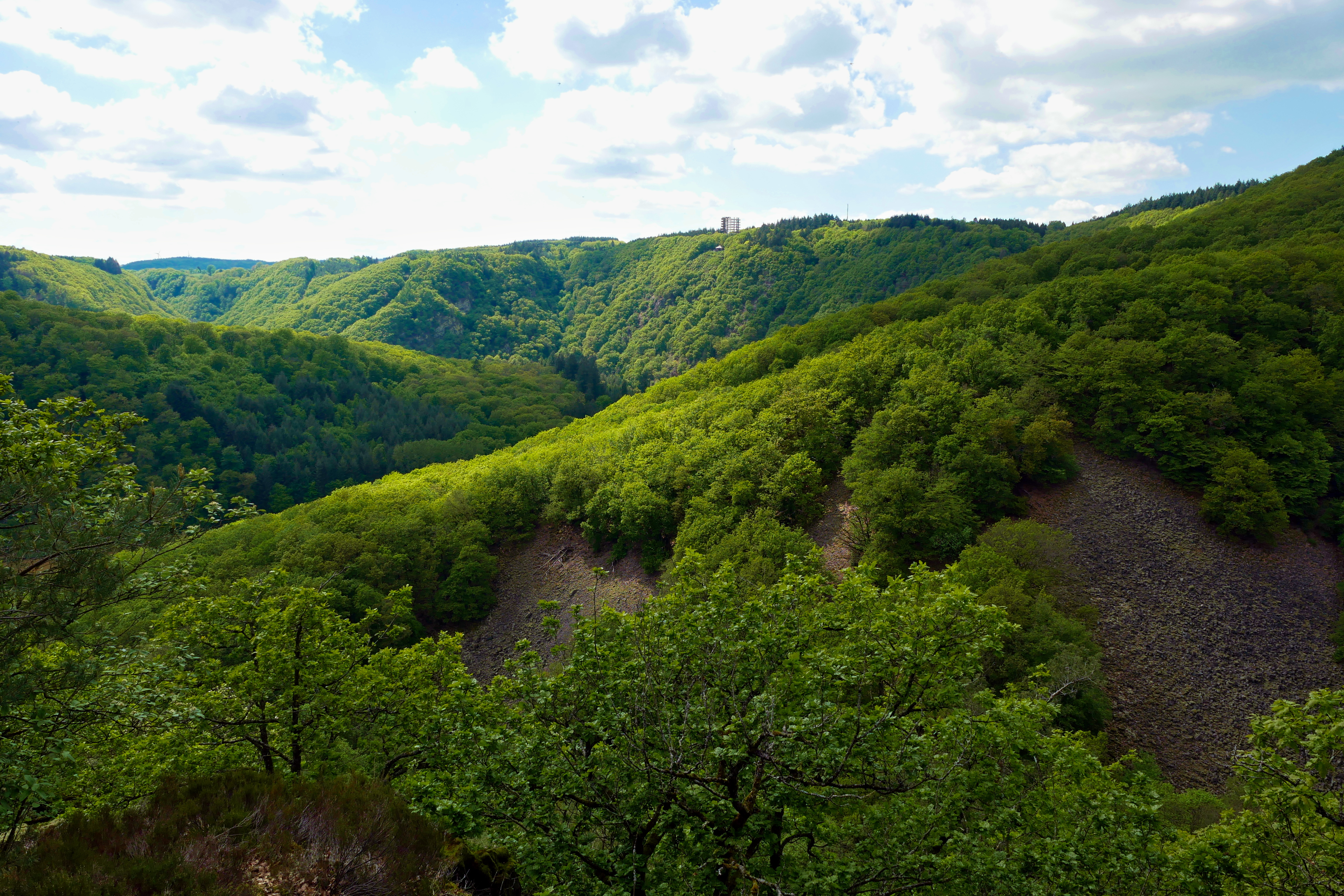 Bewaldete Hänge mit Blockhalden im Naturschutzgebiet Saar-Steilhänge /Lutwinuswald. Blickrichtung nach Westen. Im Hintergrund der Aussichtspunkt "Cloef" mit Baumwipfelpfad.